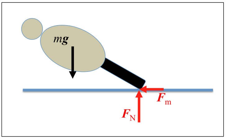 Motoristek bihurguneetan jasaten dituzten indarren eskema.